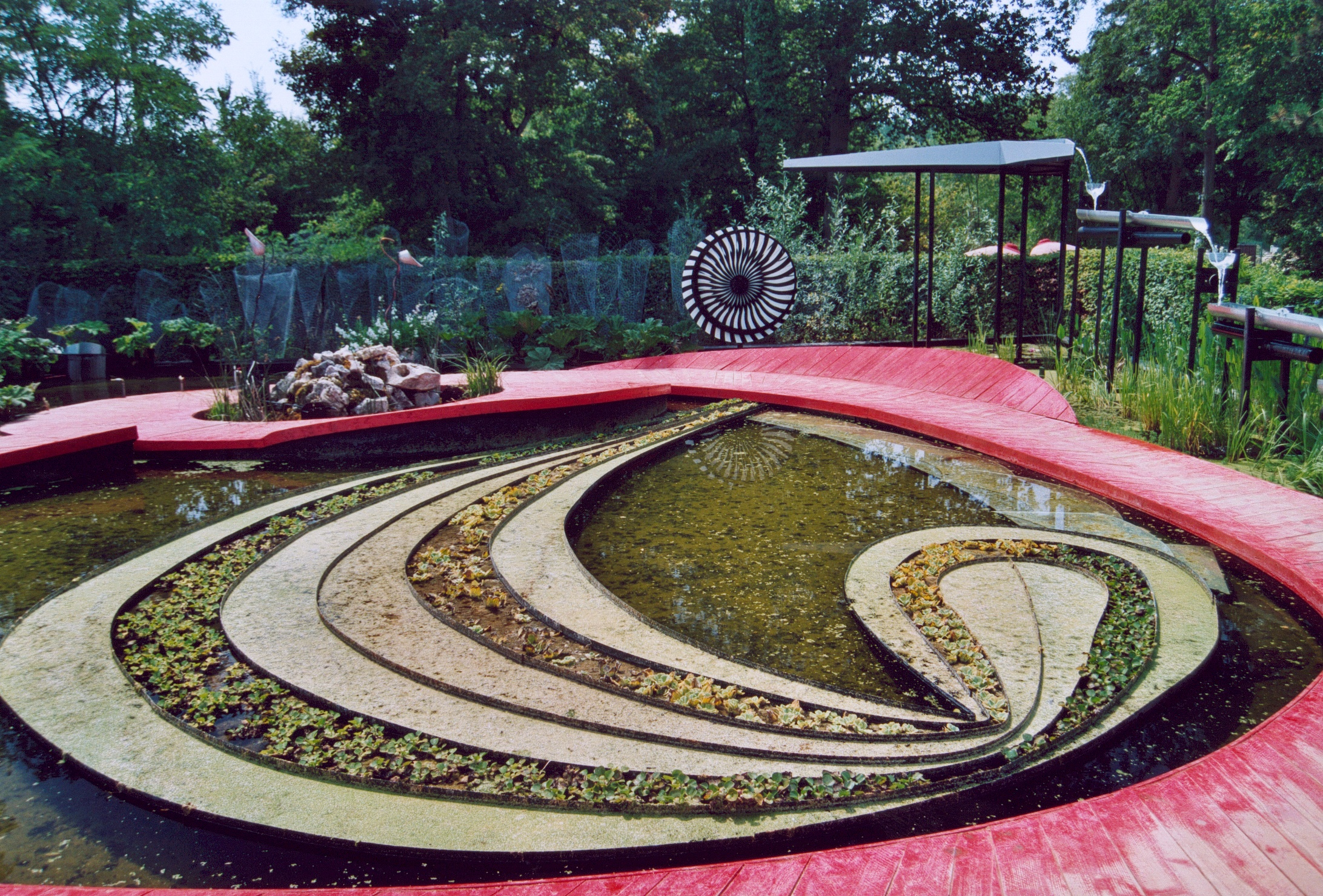 France Loir-et-Cher Festival des jardins Chaumont-sur-Loire 2004 06 La Malediction d Agamemnon Photographie prise par GIRAUD Patrick